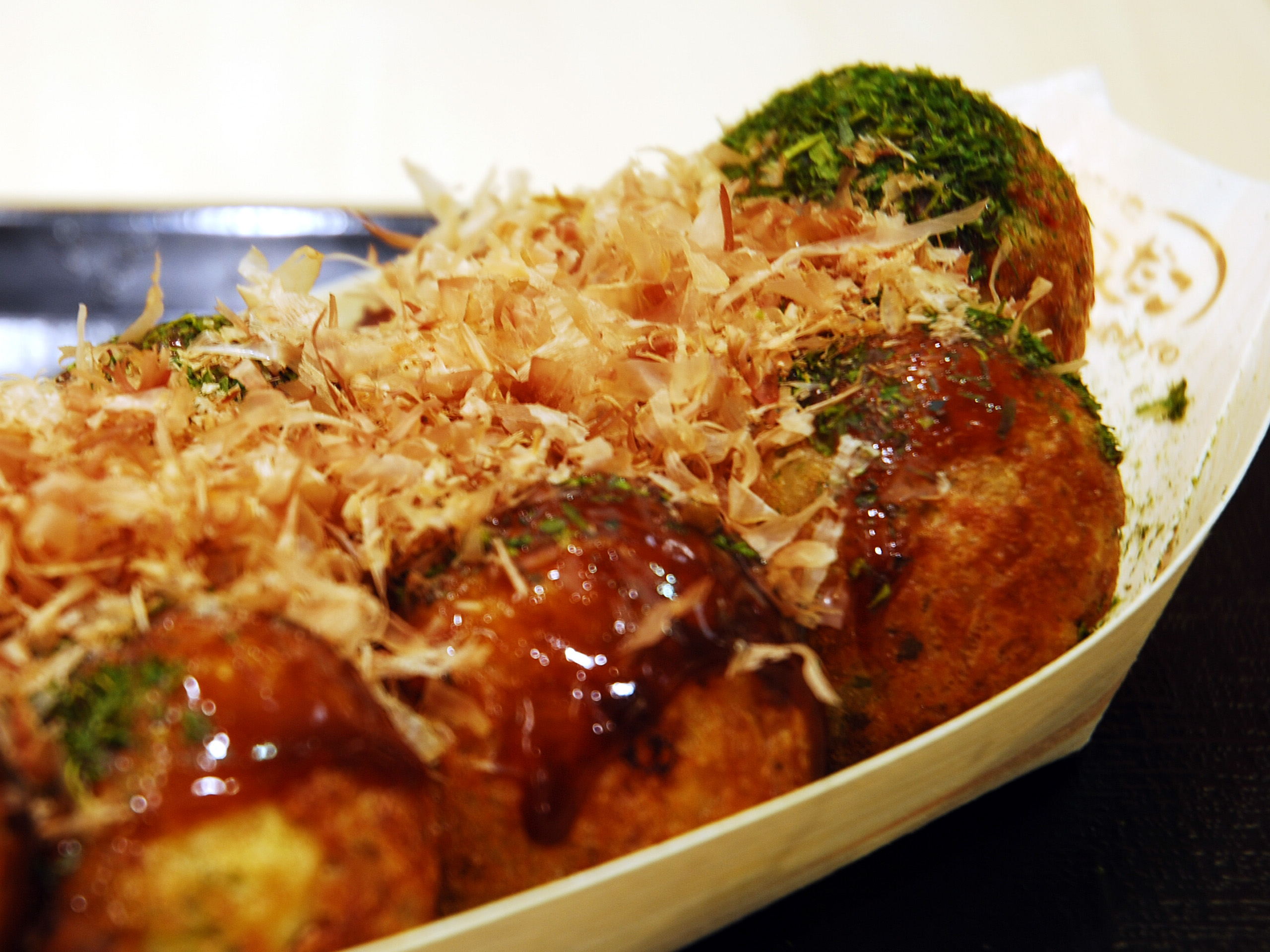 Gindako, Higashi-Shinagawa Shinagawa-ku TokyoOctopus Ball